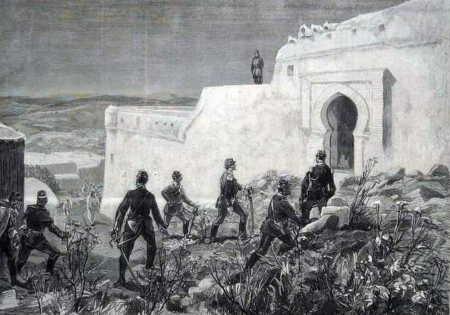 L’expédition française en Tunisie. L'état-major du général Logerot montant à la casbah de Béja le 20 mai 1881.